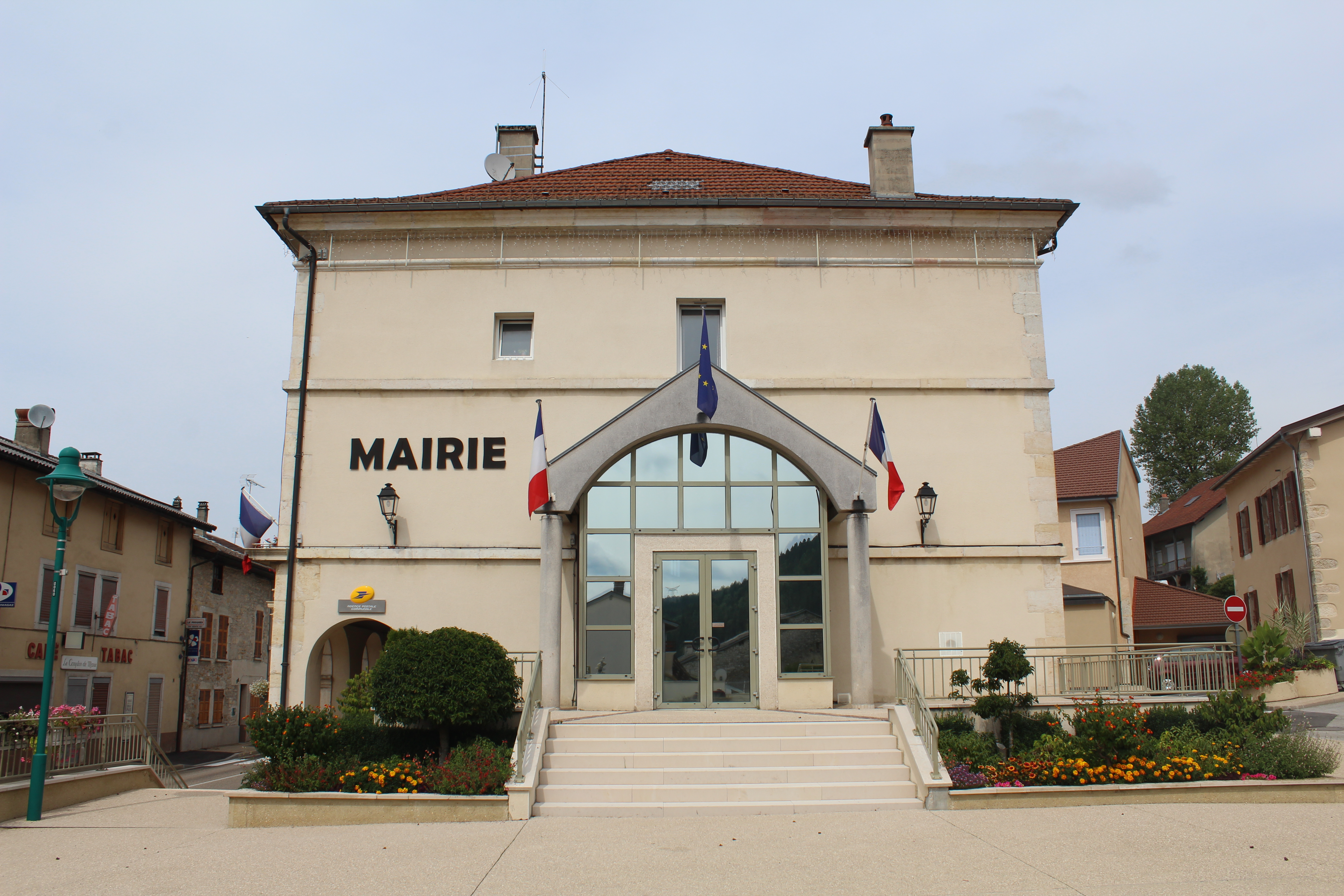 Mairie de Martignat.